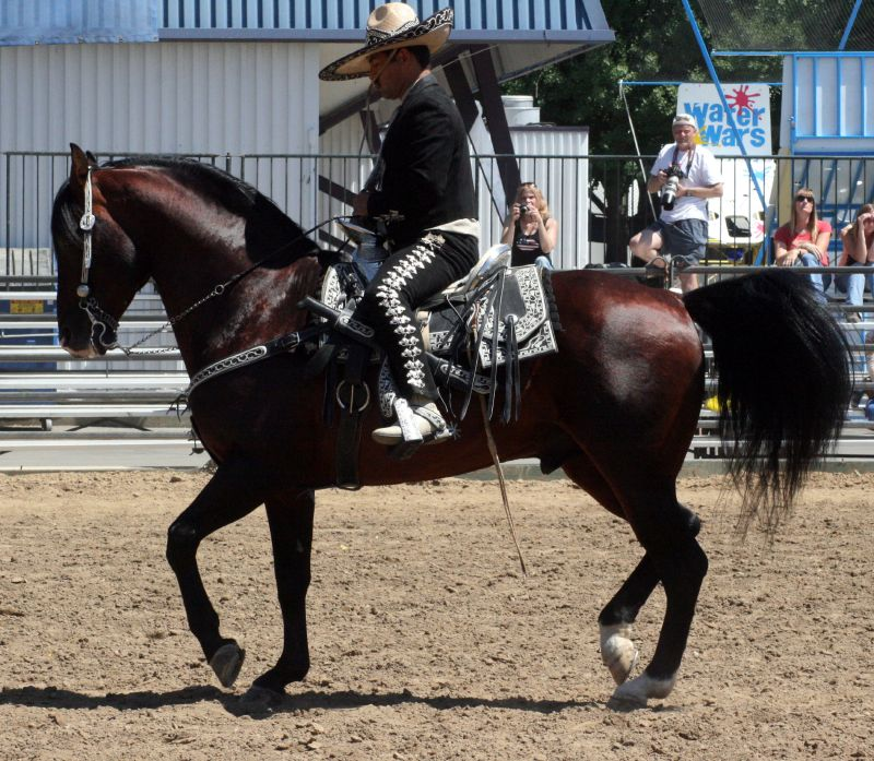 Azteca